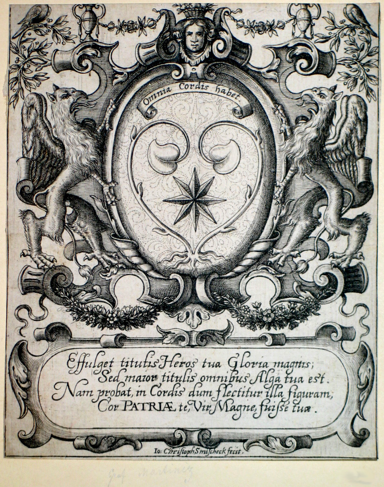 Exlibris: Wappen der Martinic (Martinitz), mit zwei Greifen als Schildhaltern und manieristischer Dekoration. Knapp beschnitten, oben mit Bildverlust. Inschrift "Omnia Cordis habet. Effulget titulis Heros..."